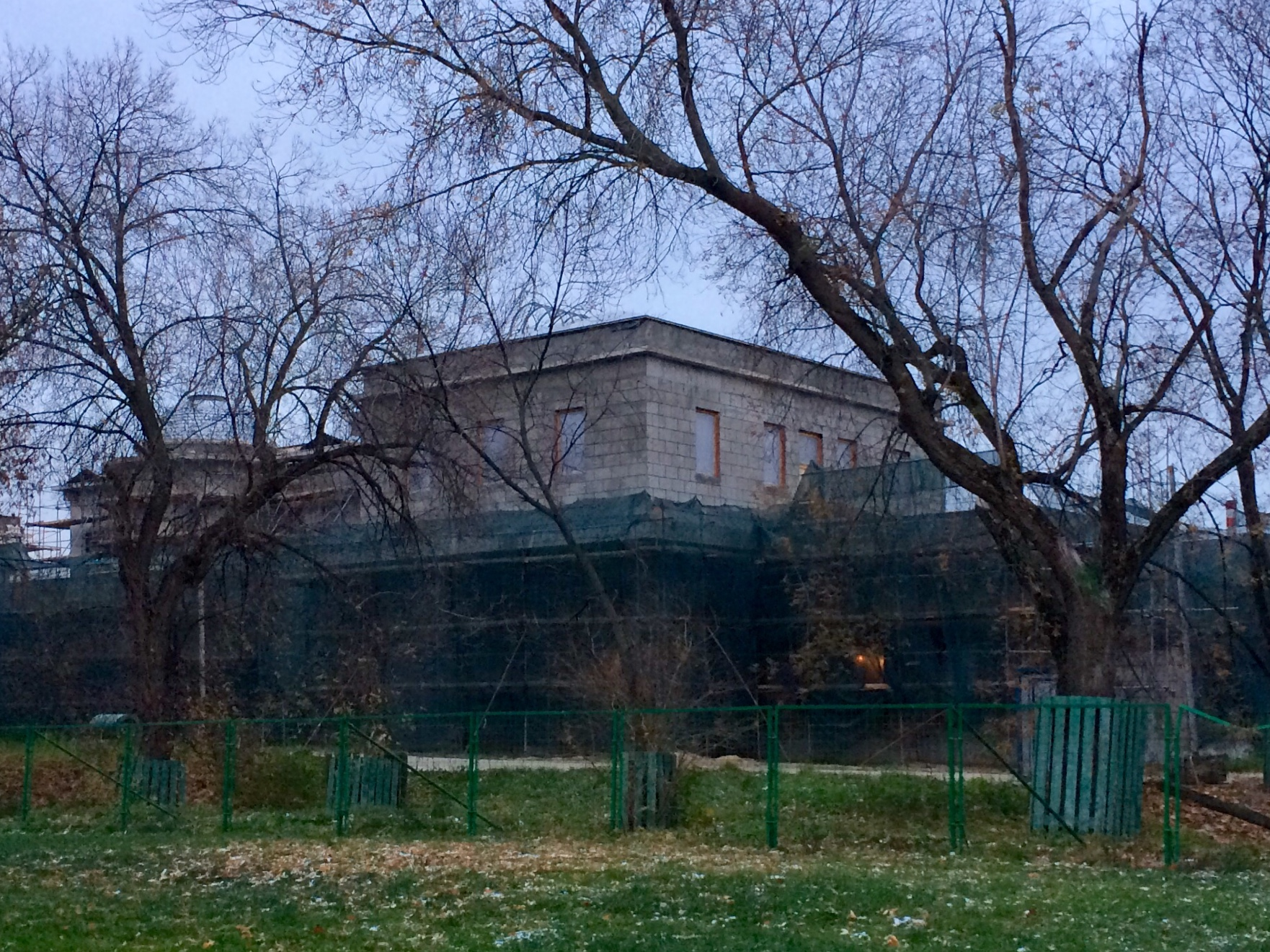 Новодел на месте усадьбы графа А. Закревского "Студенец" в парке "Красная Пресня" (Мантулинская улица, 5)